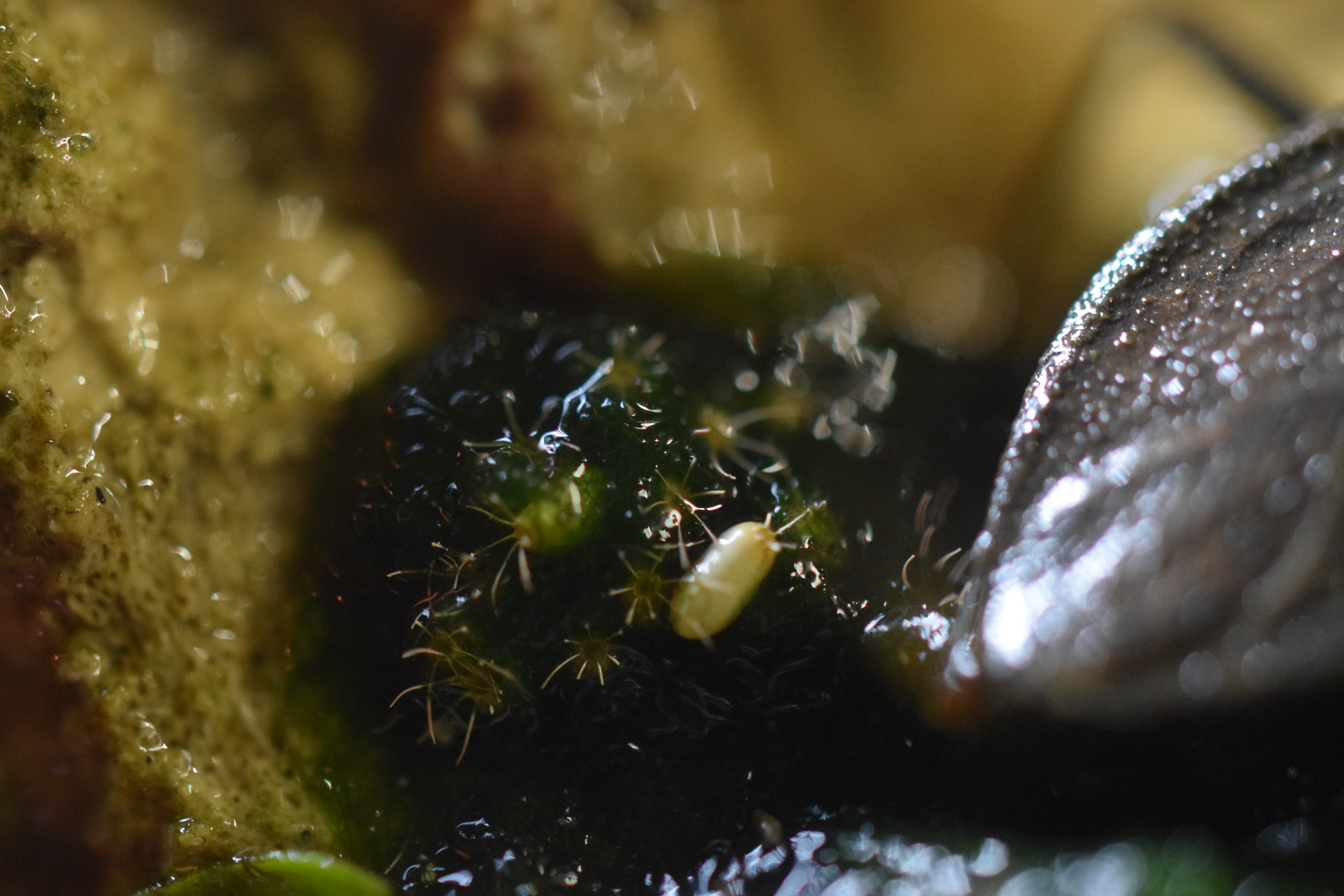 Eier in Algenwatte